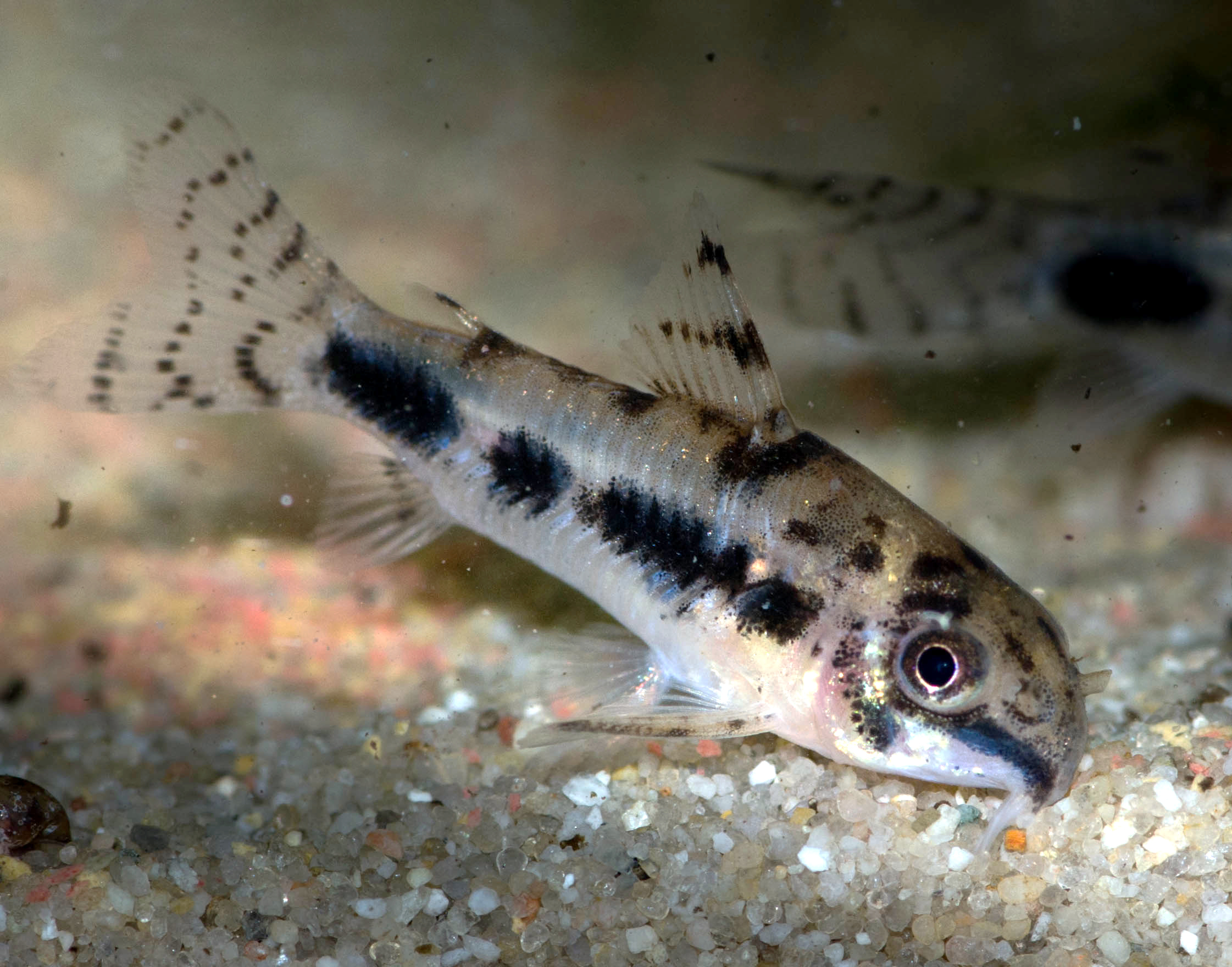 Corydoras habrosus - ein erwachsenes Männchen